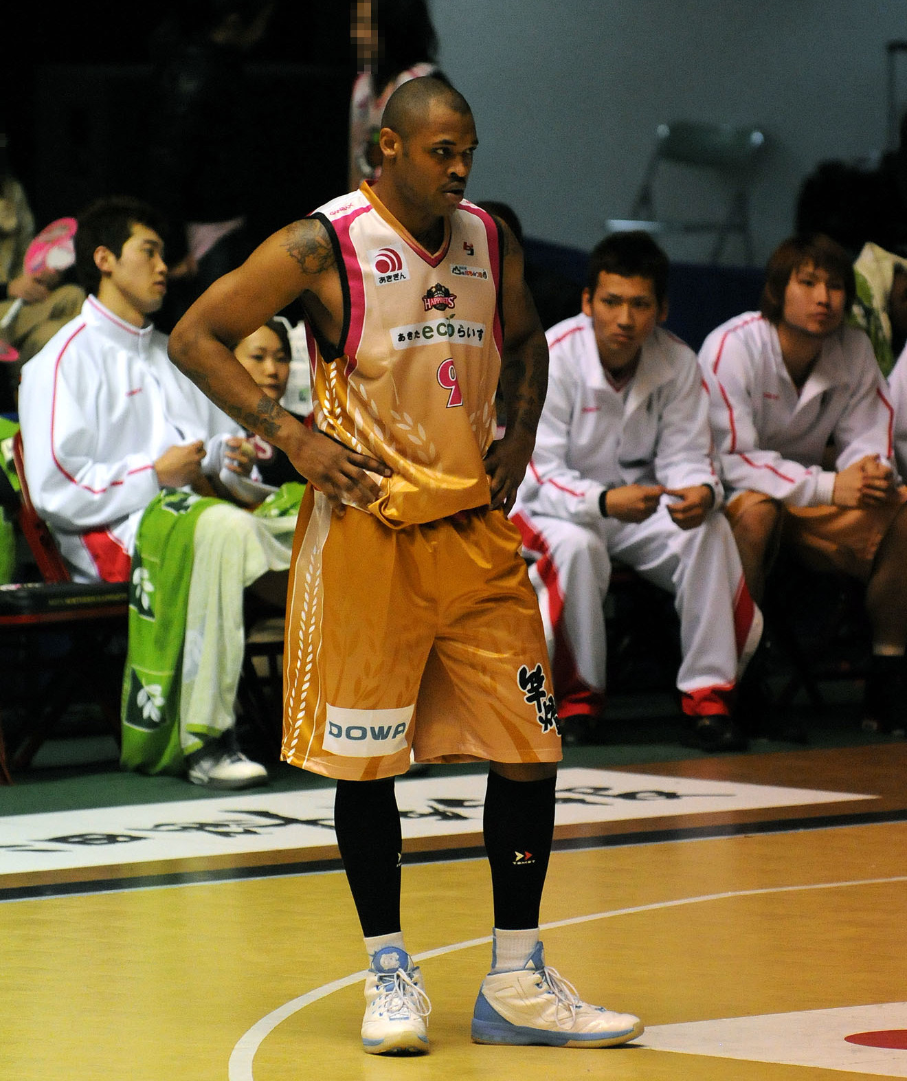 秋田ノーザンハピネッツ、ウィル・グレイヴス選手。秋田県立体育館で。